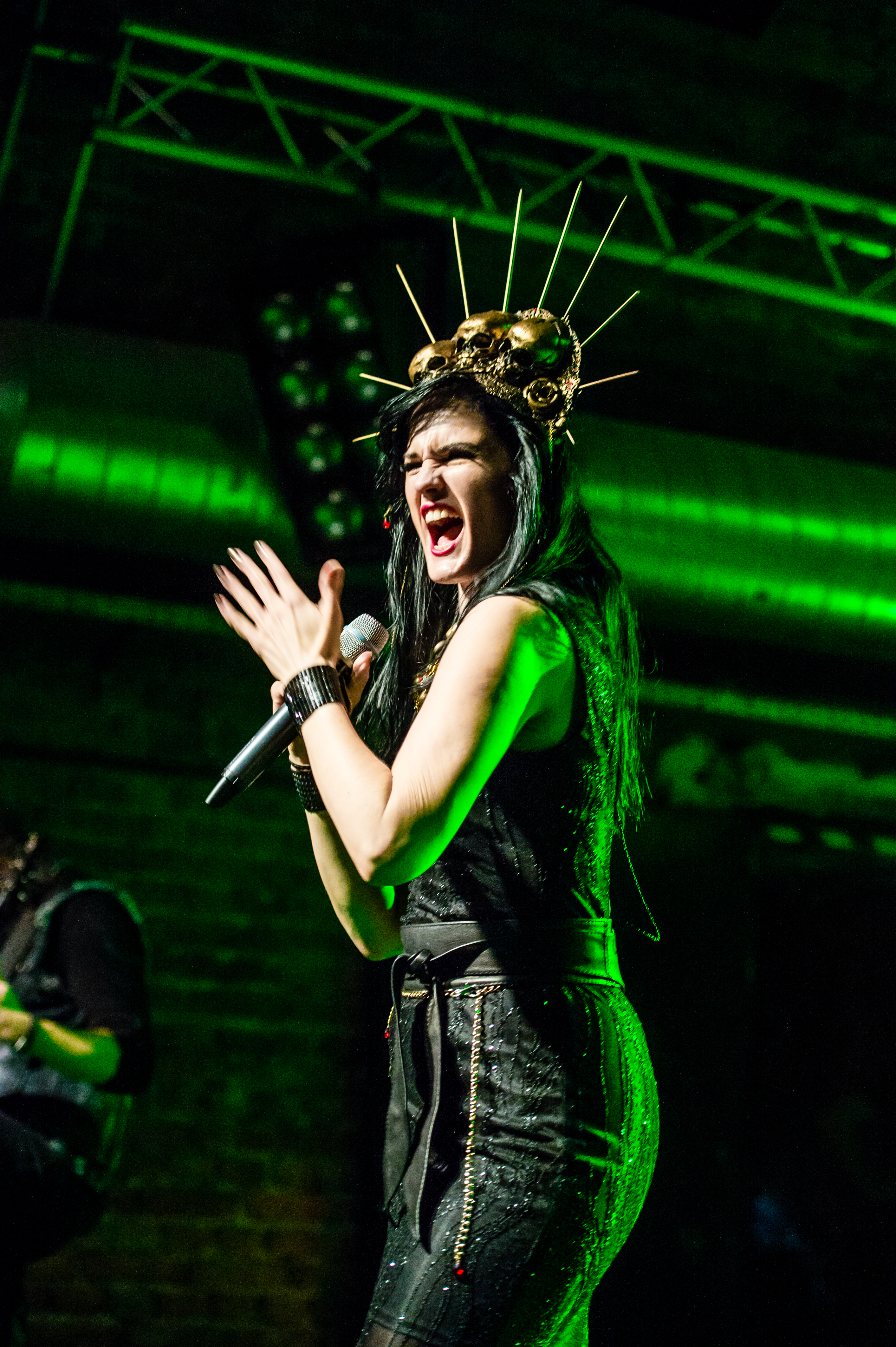 'Xandria 'Symphonic Metal Nights' Tour - Bochum Matrix'